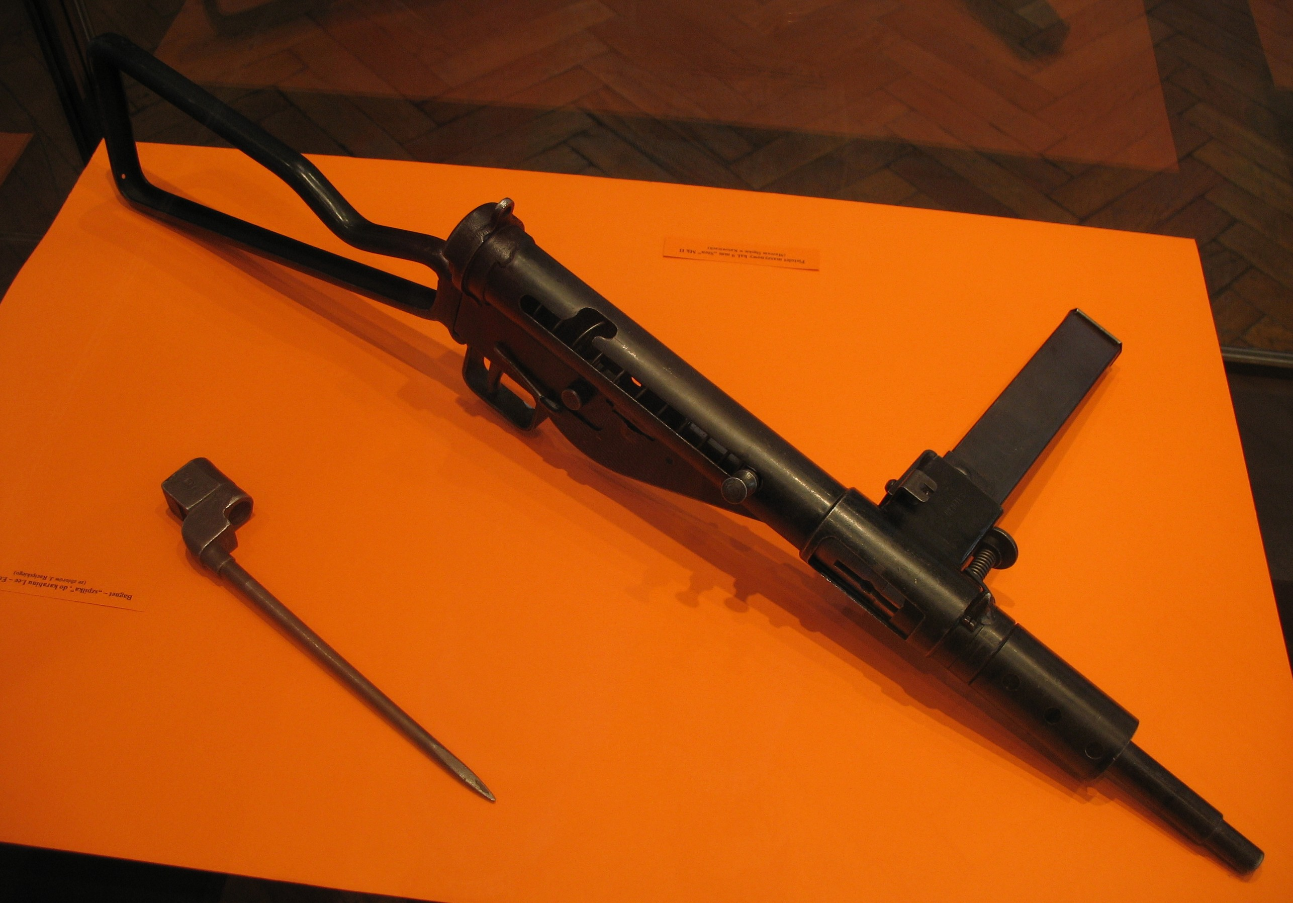 Pistolet maszynowy Sten Mk II. Obok pm lezy bagnet od karabinu No. 4 Mk I. Zdjęcie zrobione w Muzeum Górnictwa Węglowego, wystawa czasowa "Żołnierze wolności. I Dywizja Pancerna".